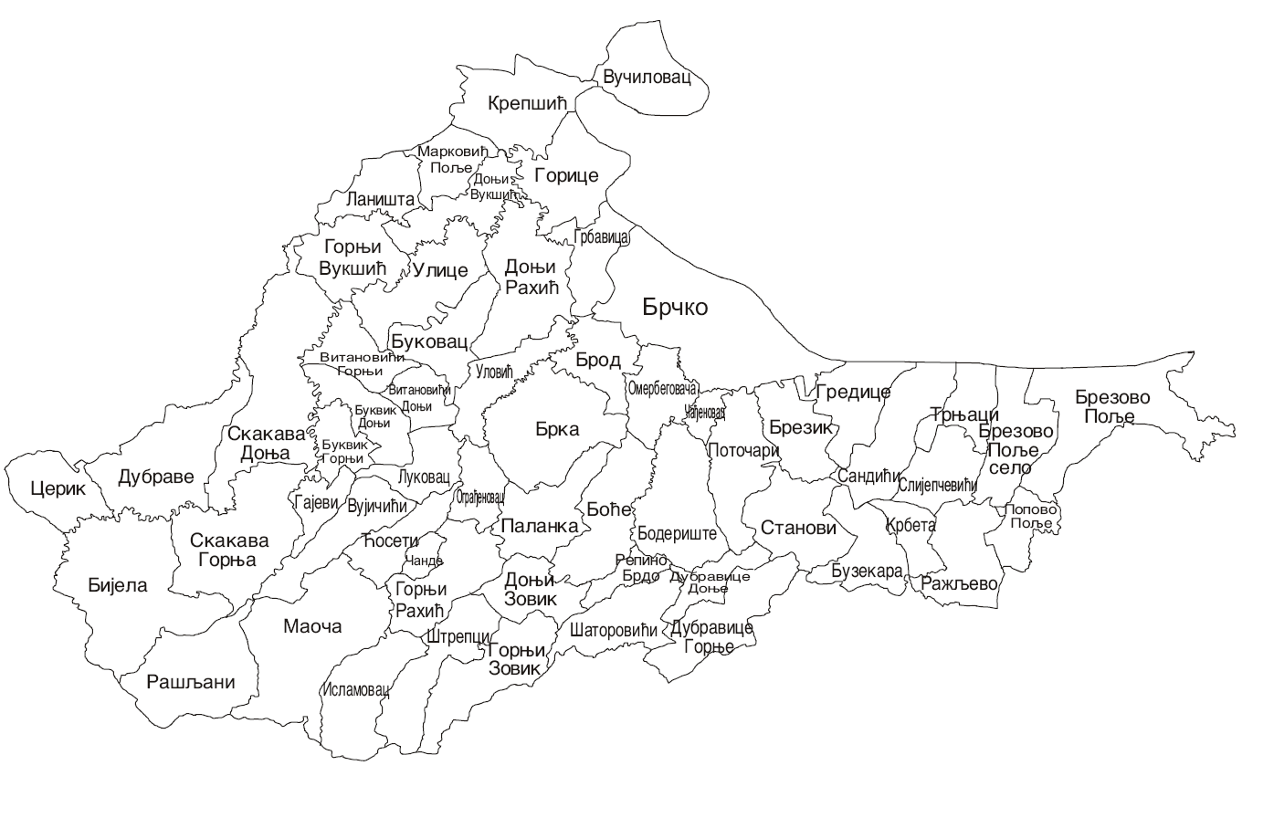 Карта Брчко Дистрикта